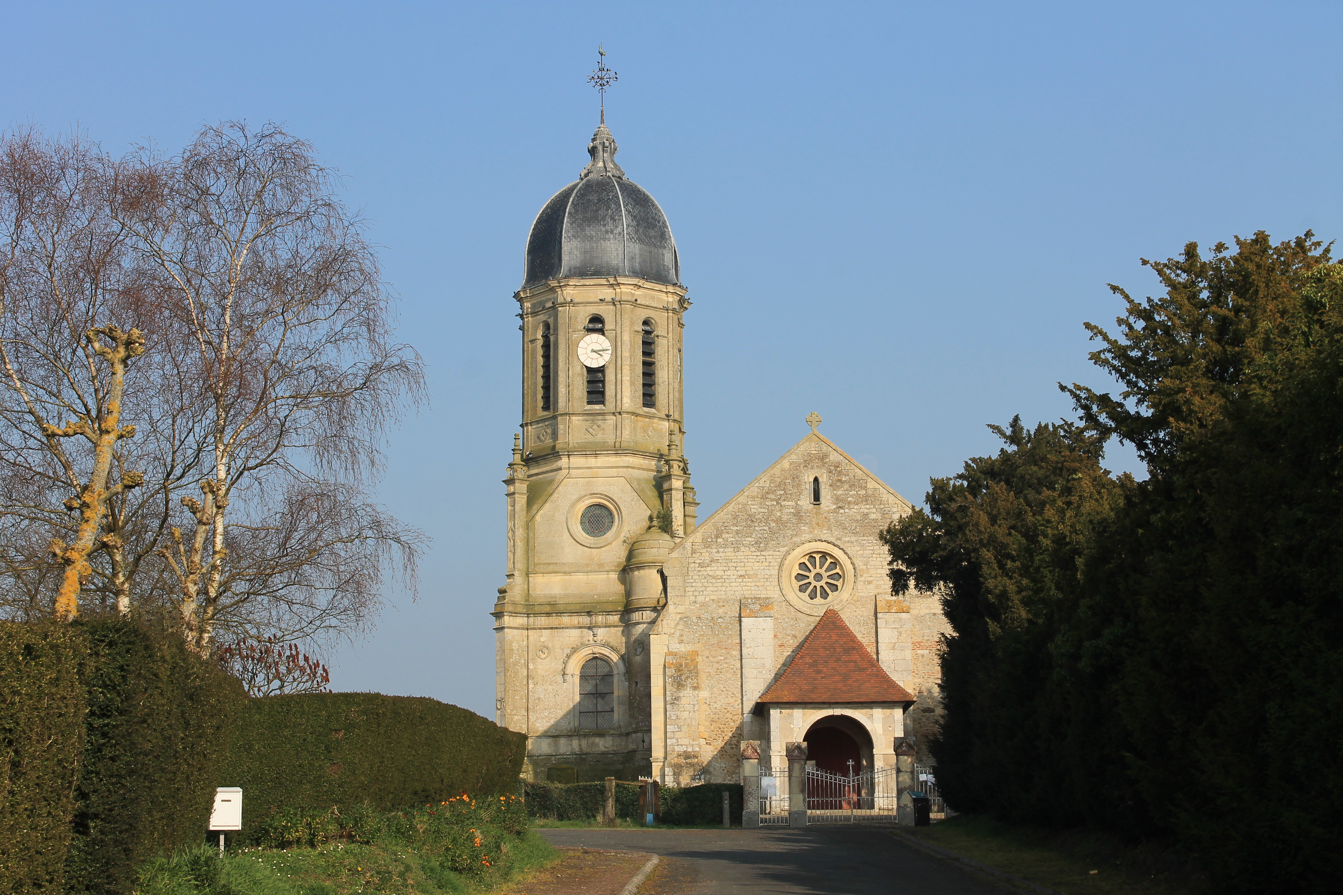 Église Saint-Georges à Hotot-en-Auge (Calvados)